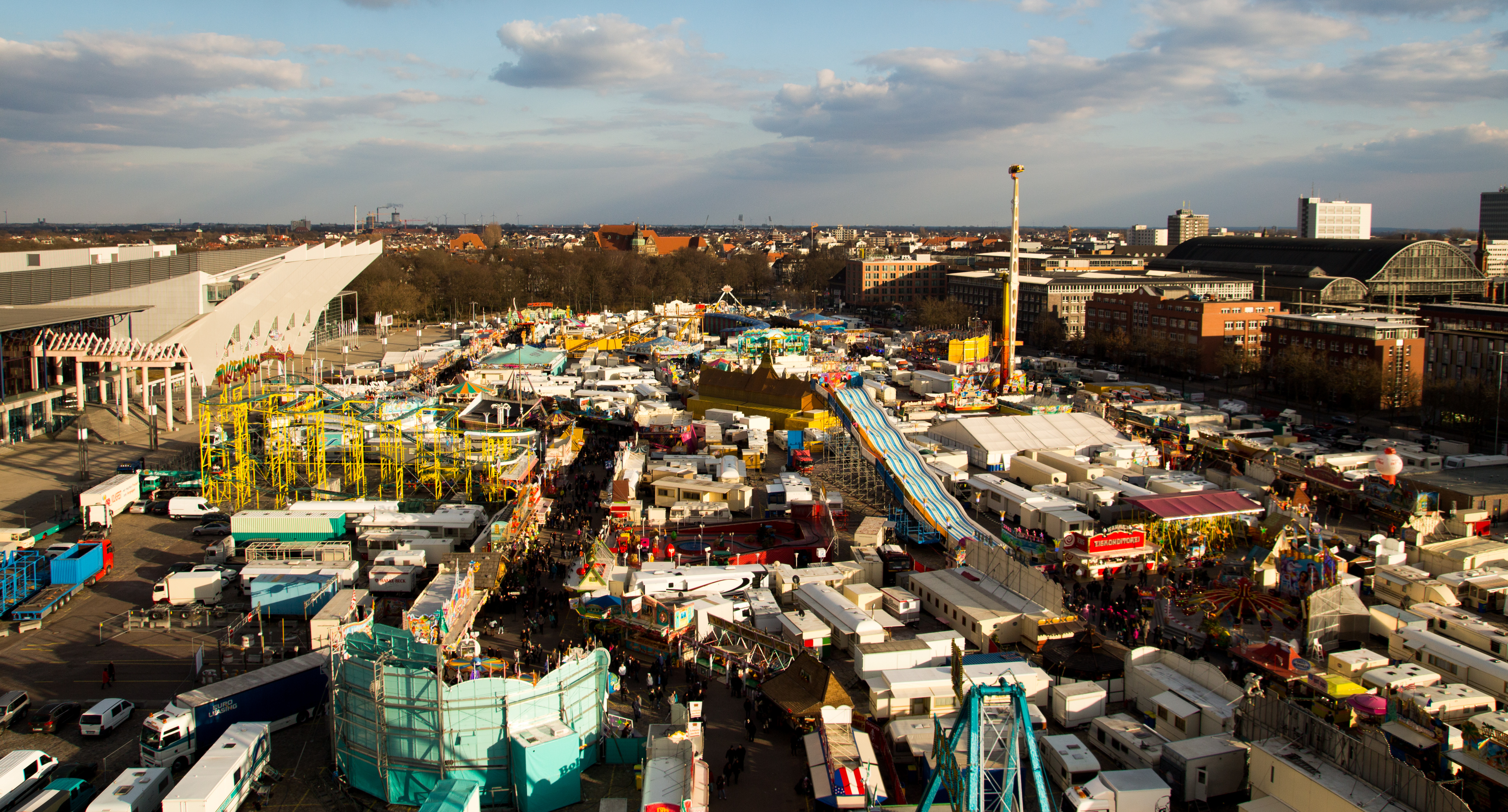 Blick vom Riesenrad auf die Bremer Osterwiese 2013. Links die vormalige Bremer Stadthalle (heute ÖVB-Arena), rechts hinten der Bremer Hauptbahnhof.